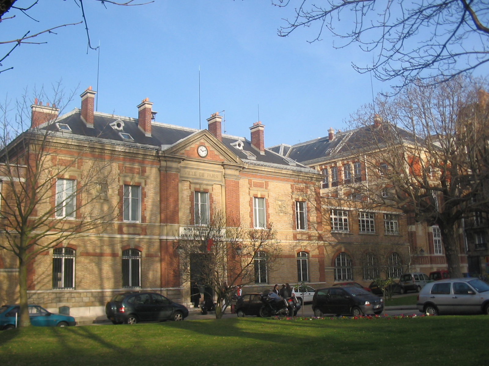 Photo de la façade avant de l'école Estienne (PARIS)